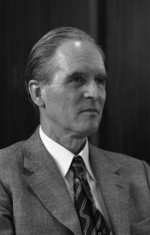 Pressekonferenz mit dem neugewählten CDU-Parteivorstand im Konrad-Adenauer-Haus (Karl Carstens)